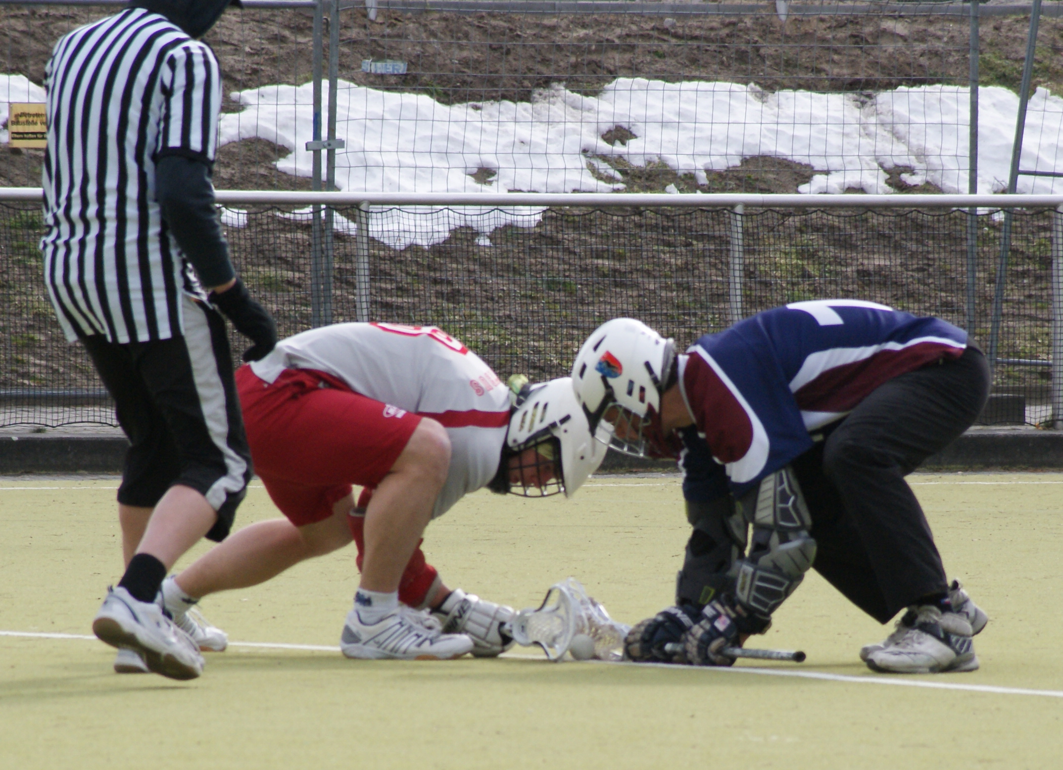 ein Faceoff beim Lacrosse